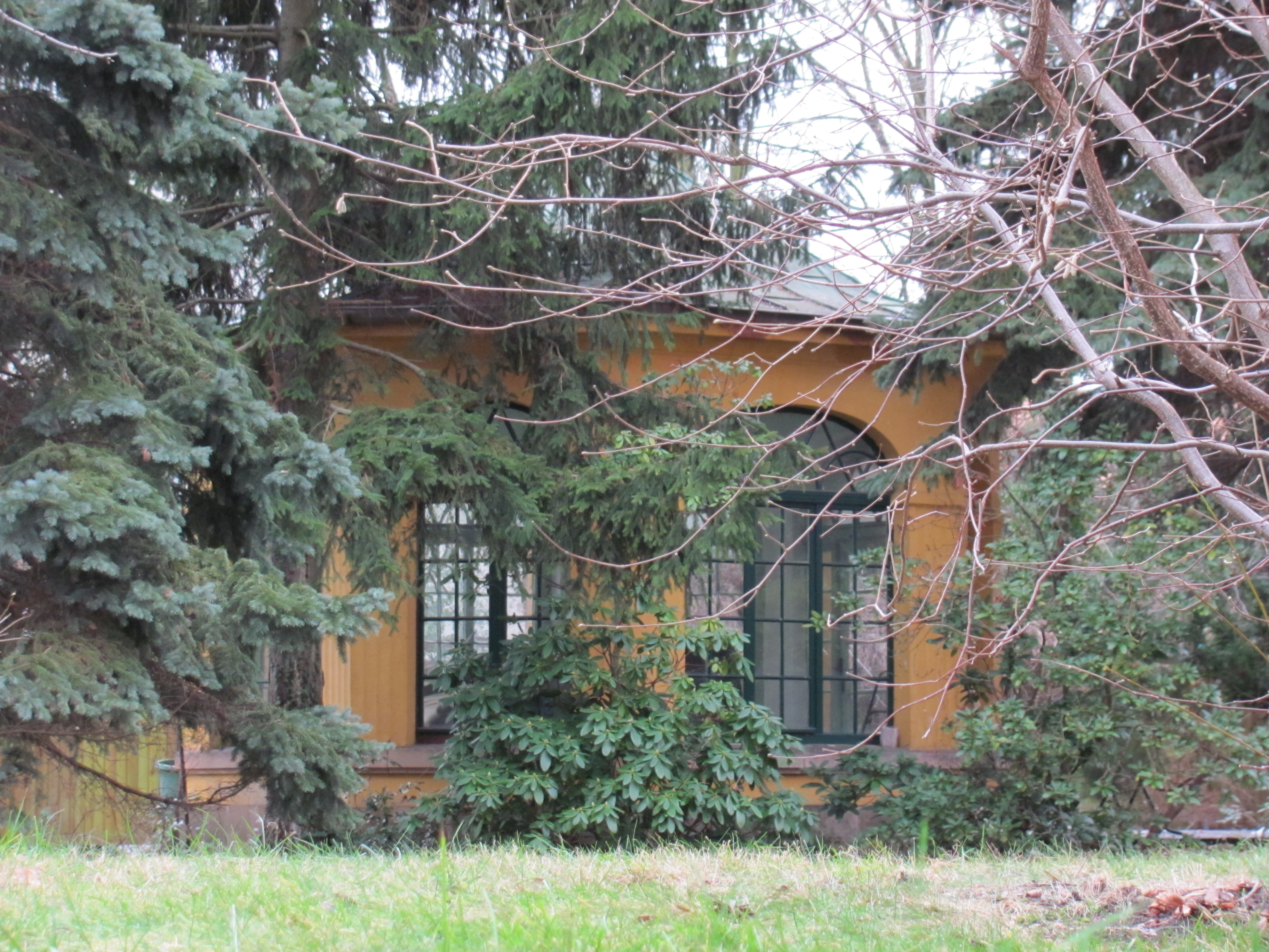 Radebeul-Niederlößnitz, Gartenpavillon Rennerbergstraße 5 (Radebeul)